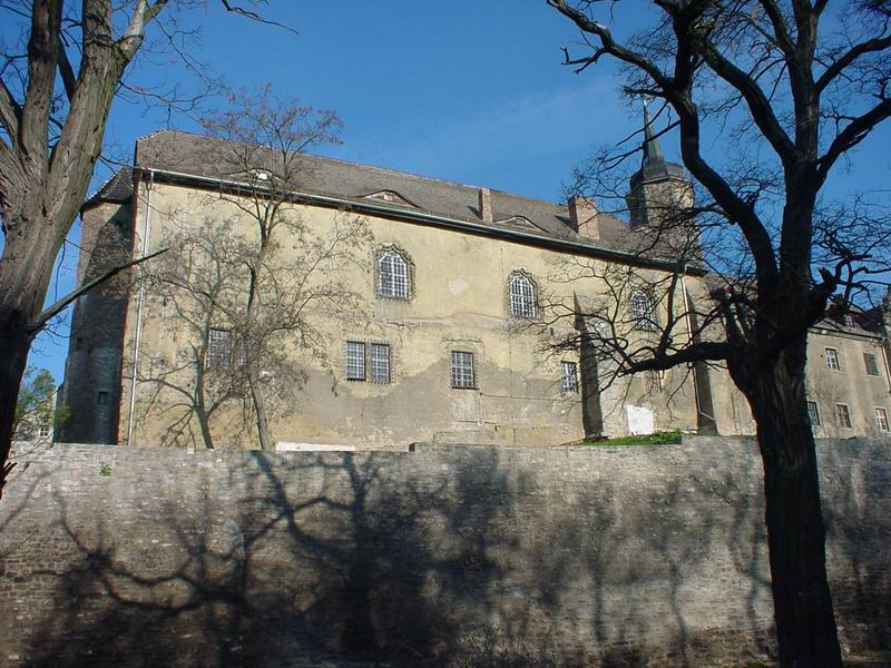 Seeburg, Mansfeldischer Schlossbau eigenes Foto von 2004